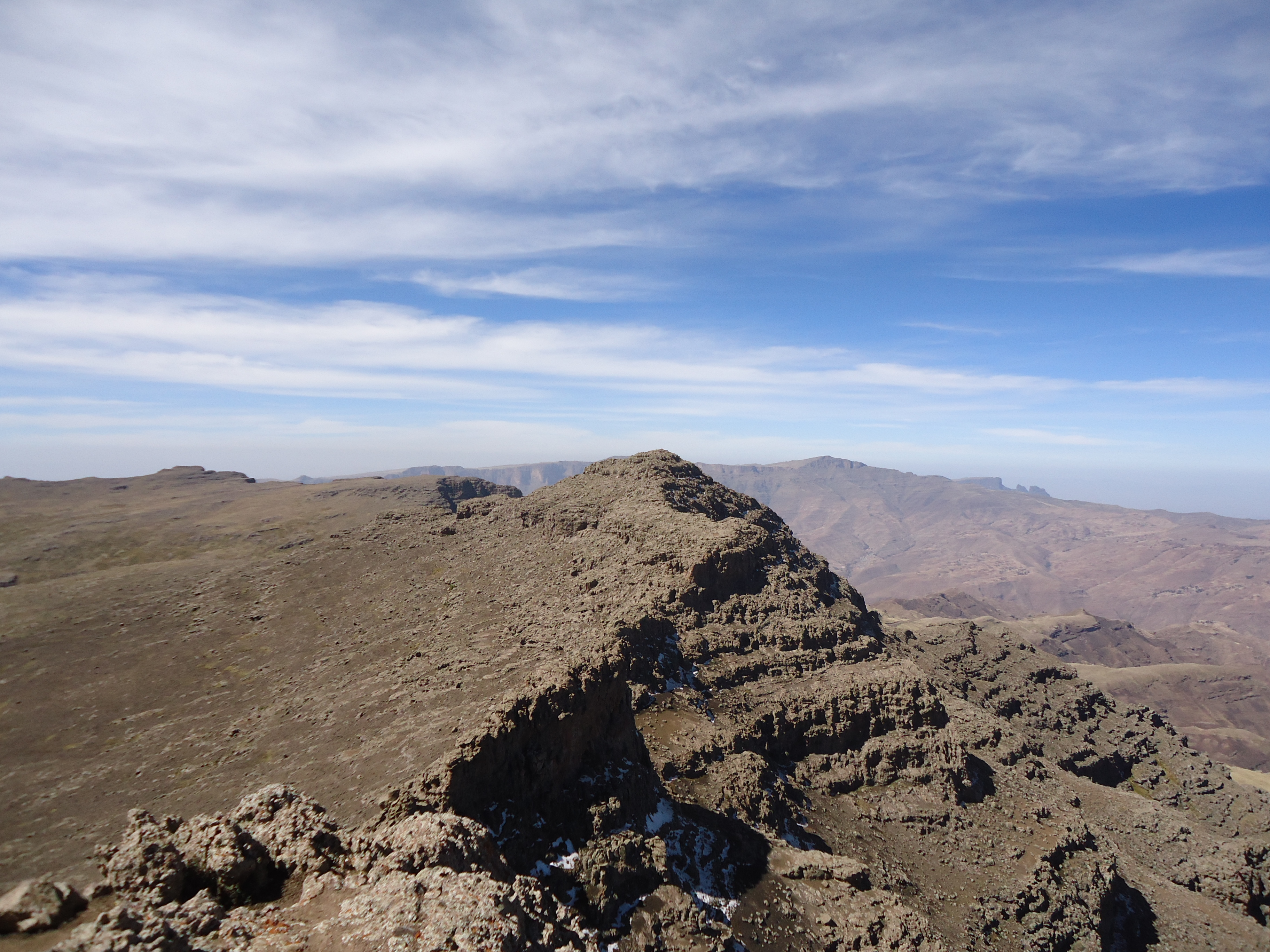 Blick vom Ras Dejen in westlicher Richtung zum Bwahit (4.430m), im Hintergrund.